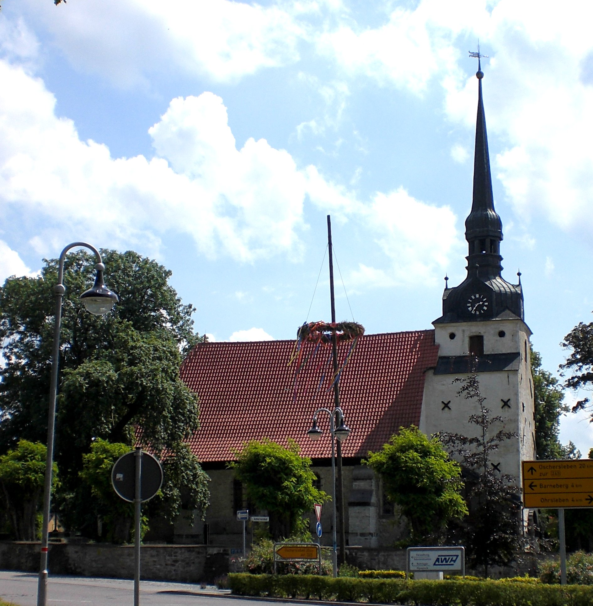 St. Bartholomäus Kirche in Hötensleben, Nordseite